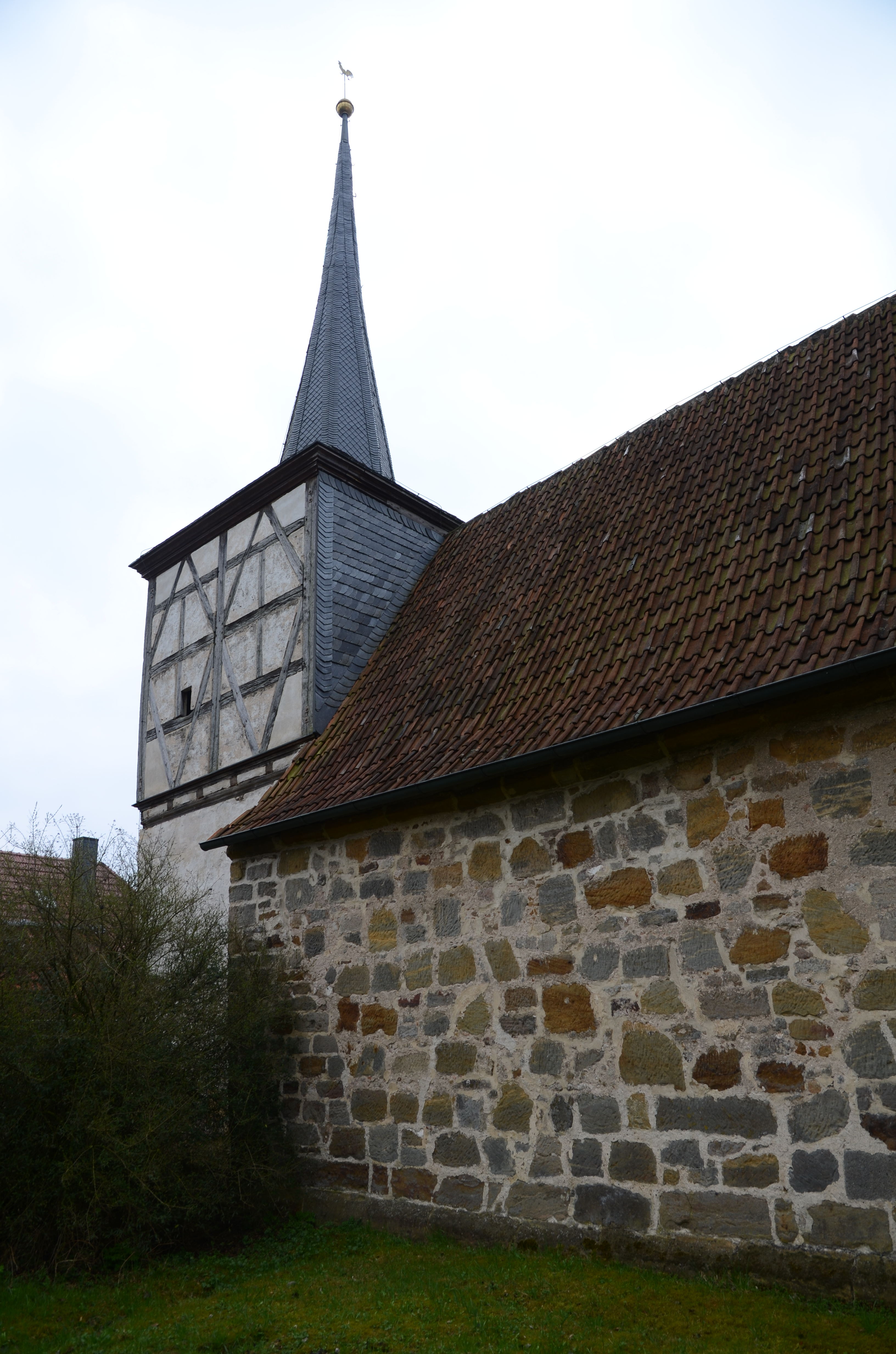 evang.-luth. Kirche St. Michael in Obermerzbach